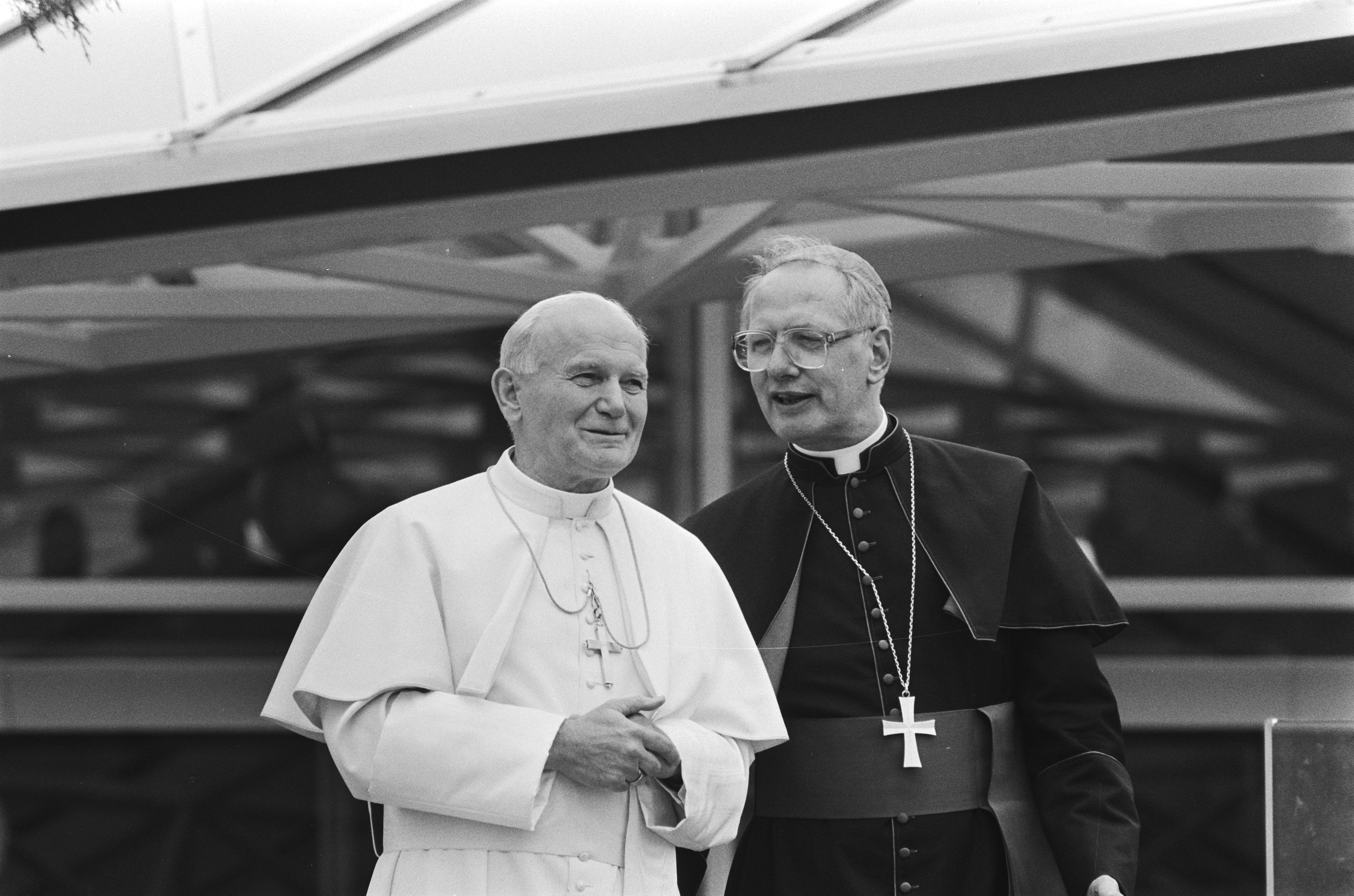 Collectie / Archief : Fotocollectie Anefo Reportage / Serie : [ onbekend ] Beschrijving : Bezoek Paus Johannes Paulus II aan Nederland; de Paus met kardinaal Simonis na aankomst Datum : 11 mei 1985 Trefwoorden : aankomsten, bezoeken, kardinalen, pausen Persoonsnaam : Johannes Paulus II (paus), Simonis, Ad Fotograaf : Croes, Rob C. / Anefo Auteursrechthebbende : Nationaal Archief Materiaalsoort : Negatief (zwart/wit) Nummer archiefinventaris : bekijk toegang 2.24.01.05 Bestanddeelnummer : 933-3247